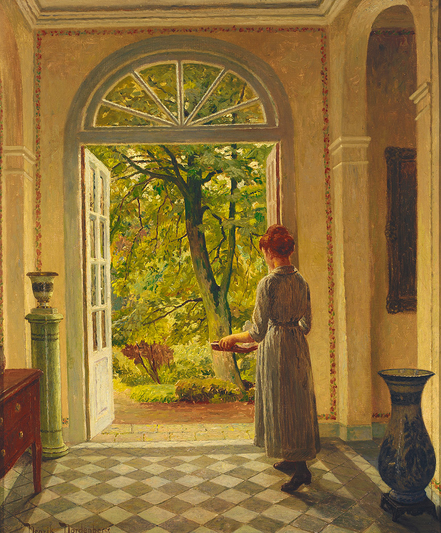 Blick aus dem Entrée einer herrschaftlichen Villa in den Gartentitle QS:P1476,de:"Blick aus dem Entrée einer herrschaftlichen Villa in den Garten" label QS:Lde,"Blick aus dem Entrée einer herrschaftlichen Villa in den Garten"